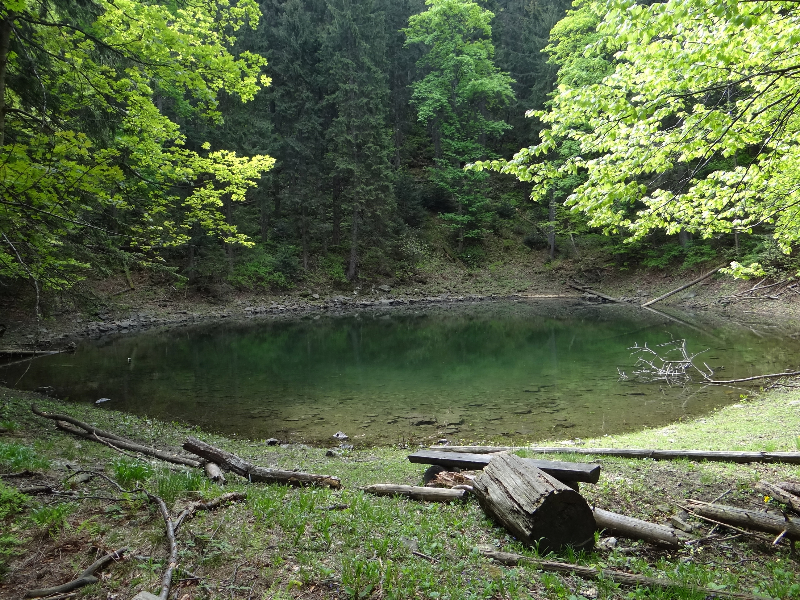 Mokry Stawek